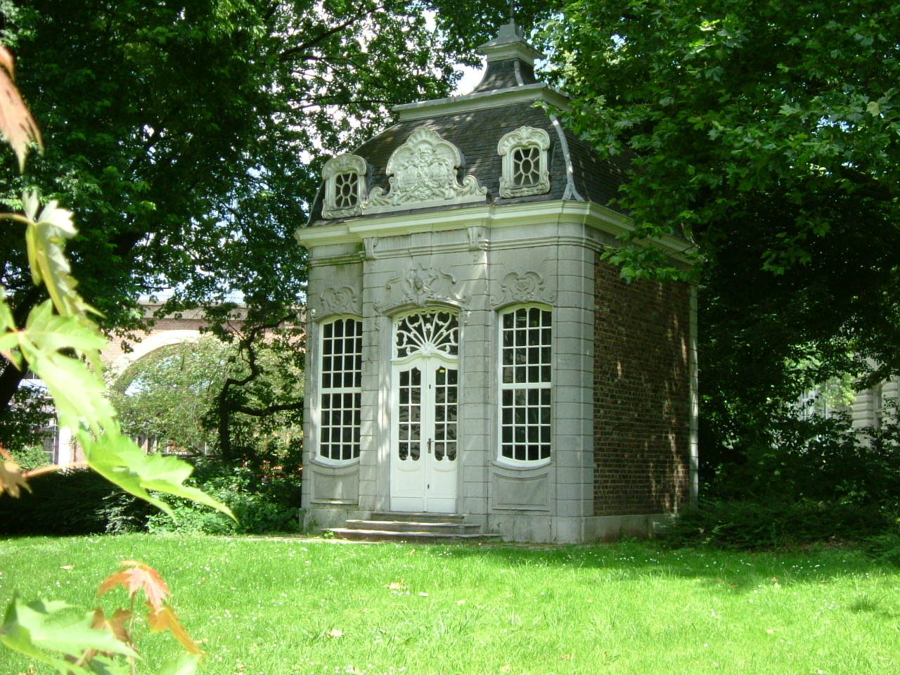 Der Couven-Pavillion am Randes des Burtscheider Kurparks